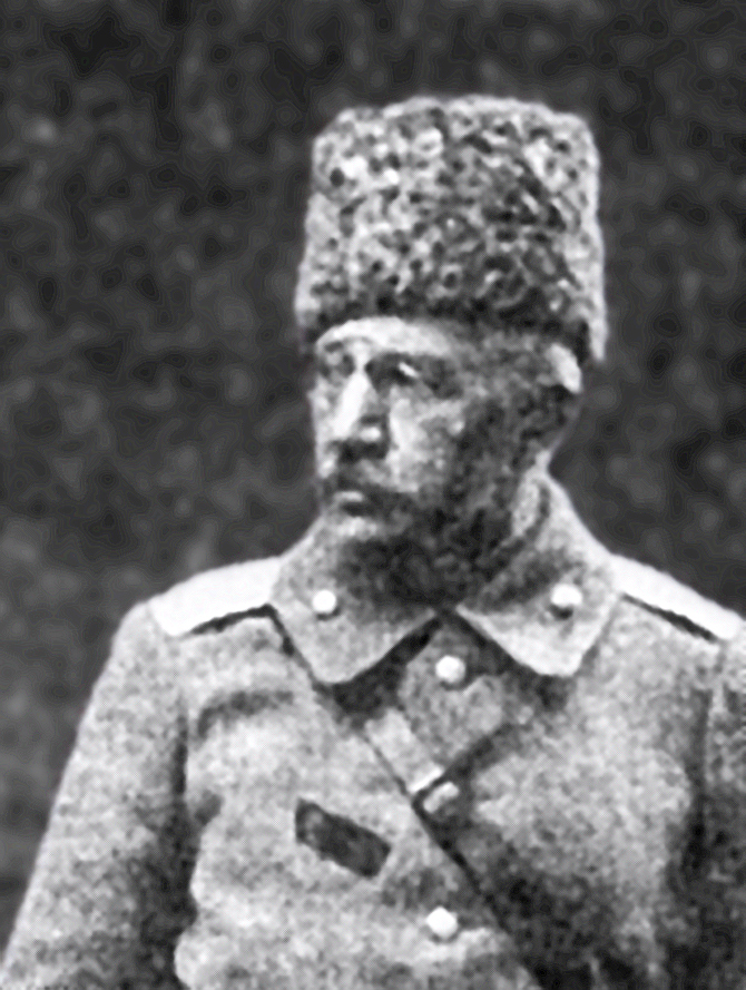 Командный состав Добровольческой армии: генералы А.П. Богаевский, А.И. Деникин, П.Н. Краснов. Станция Чир. 1918 г.